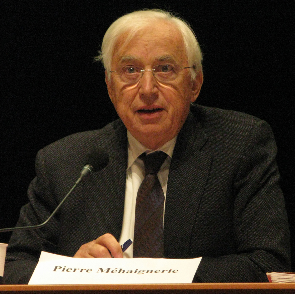 Pierre Méhaignerie, député UMP d'Ille-et-Vilaine, Président de la commission des affaires sociales à l'Assemblée nationale, lors de la présentation du Pacte Civique le 15 mai 2011